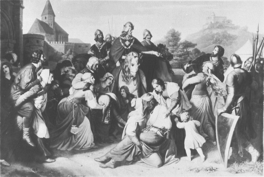 Die Weiber von Weinsberg. Ölgemälde, 111 × 165,5 cm. Staatsgalerie Stuttgart, Inv.Nr. 699